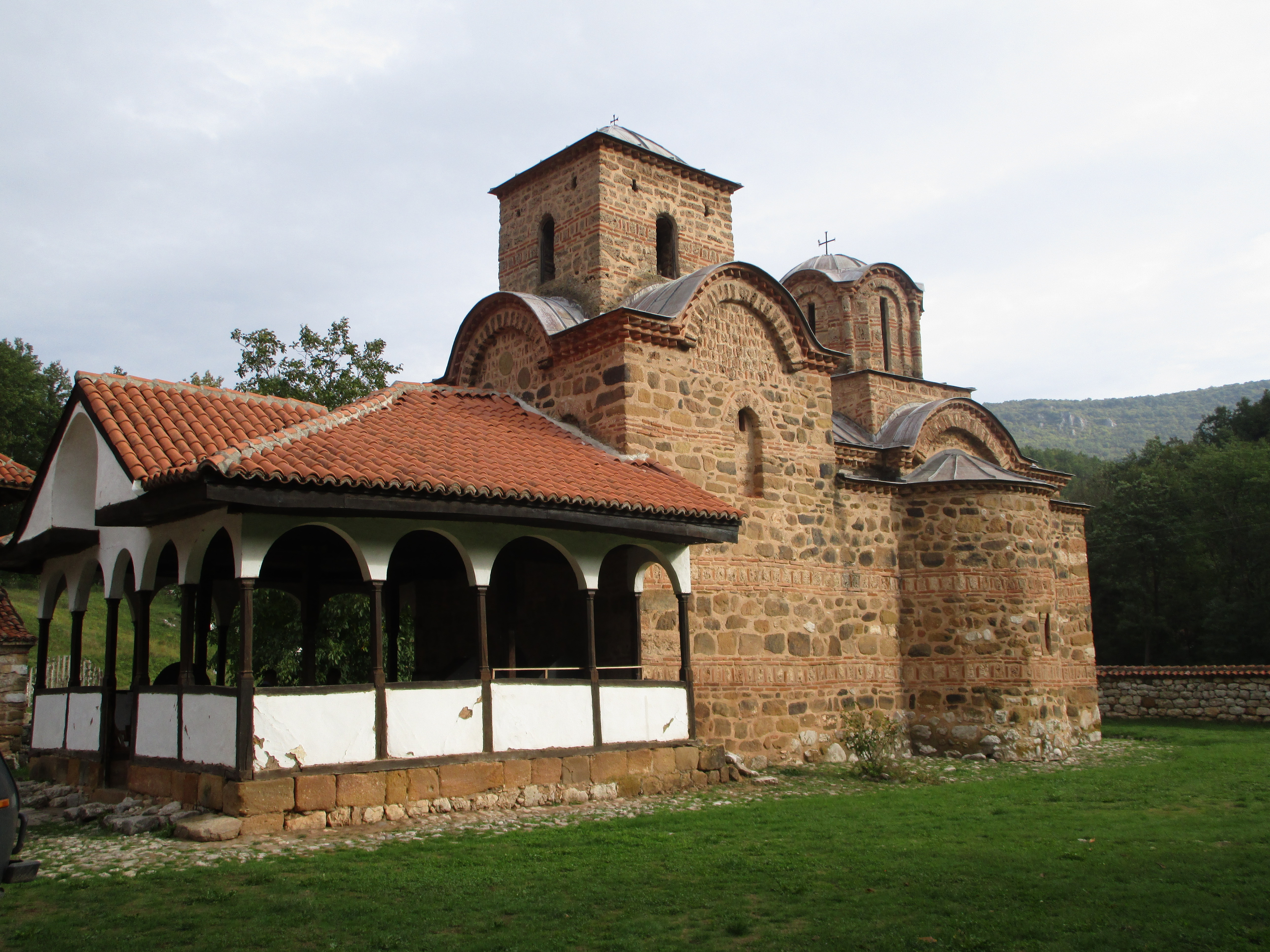 Српски (ћирилица): Манастир Поганово